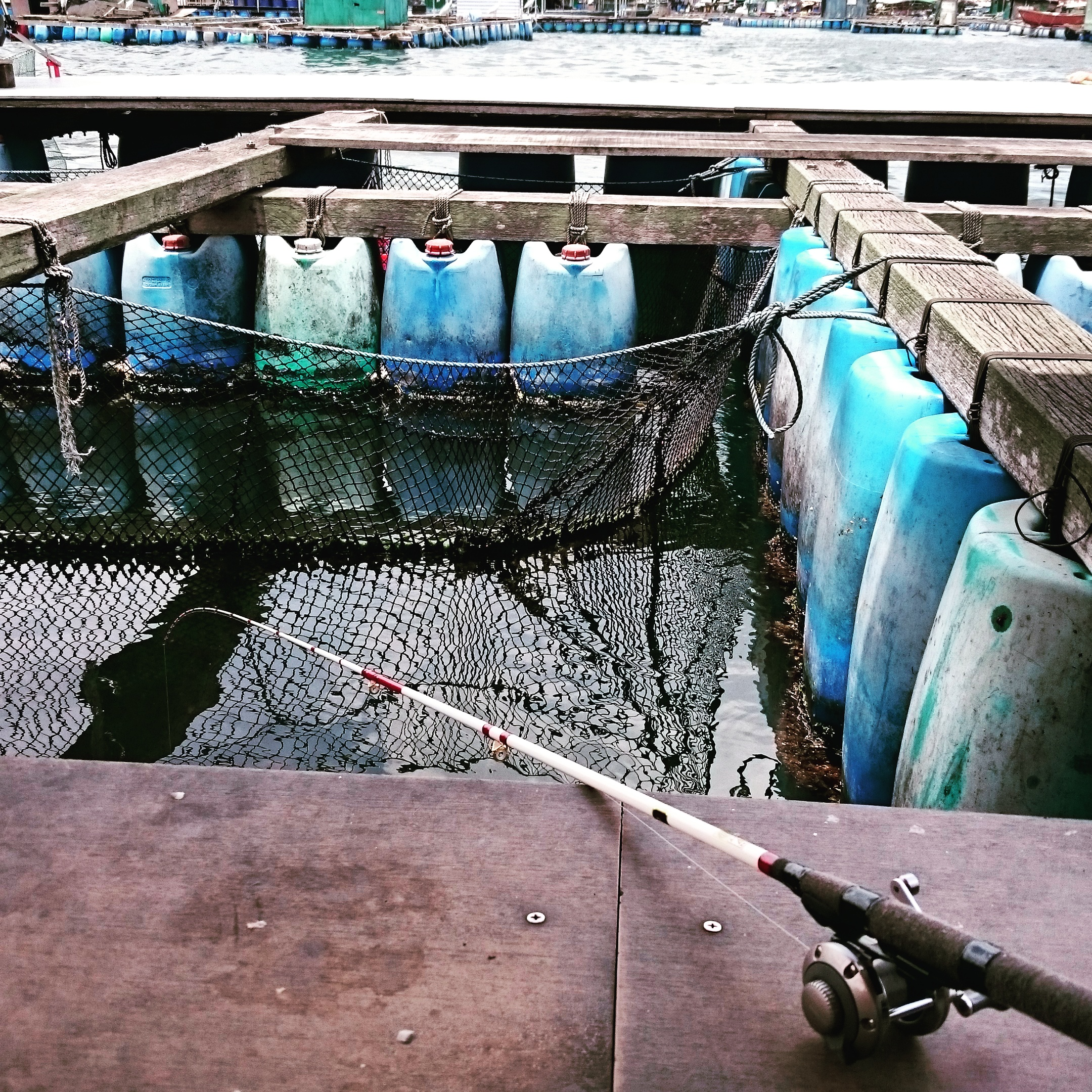 中文（香港）: 筏竿適合於魚排中垂釣使用。